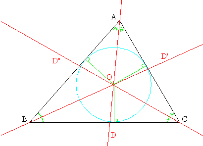 Autor: Usuario:Romero Schmidtke Tomada de Categoría:Matemáticas (imagen)